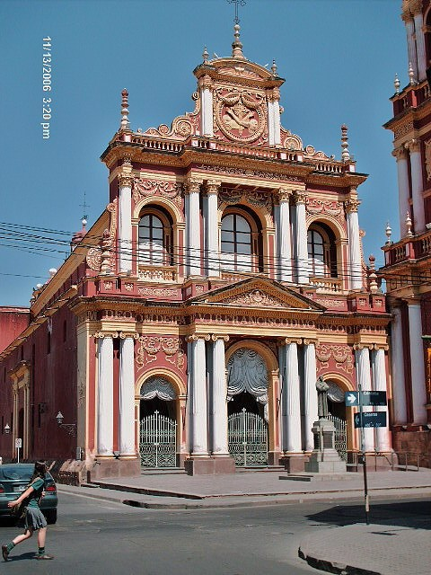 Iglesia de San Francisco